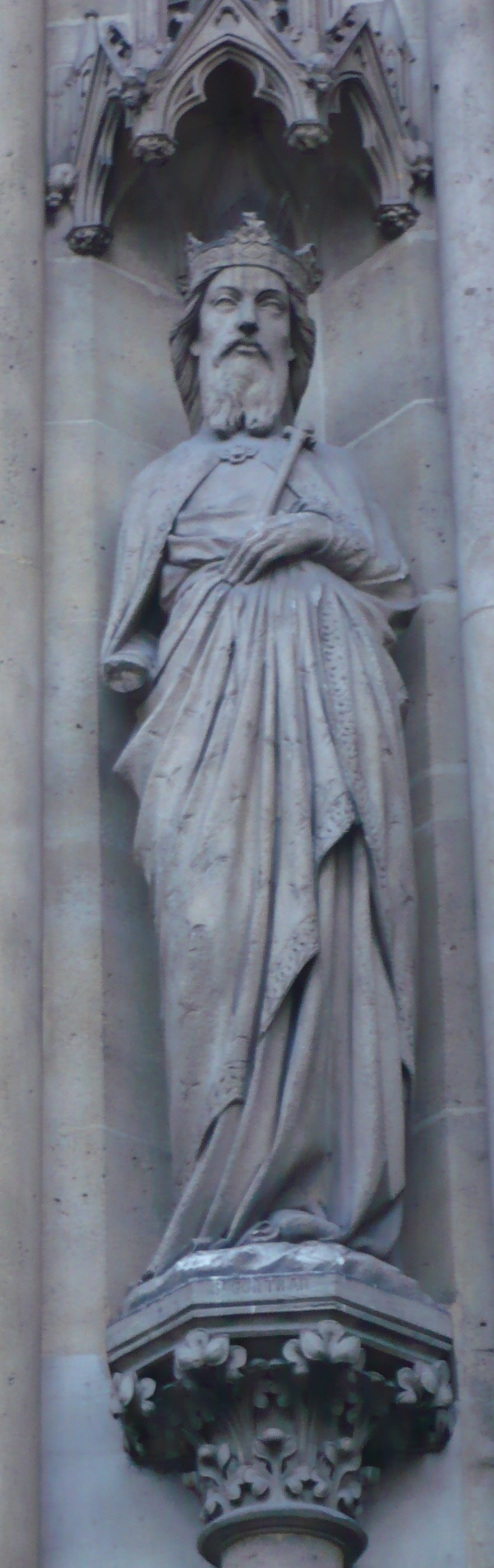 Statue représentant saint Gontran sur la partie gauche du porche d'entrée de la basilique sainte Clotilde à Paris, VIIème arrondissement.